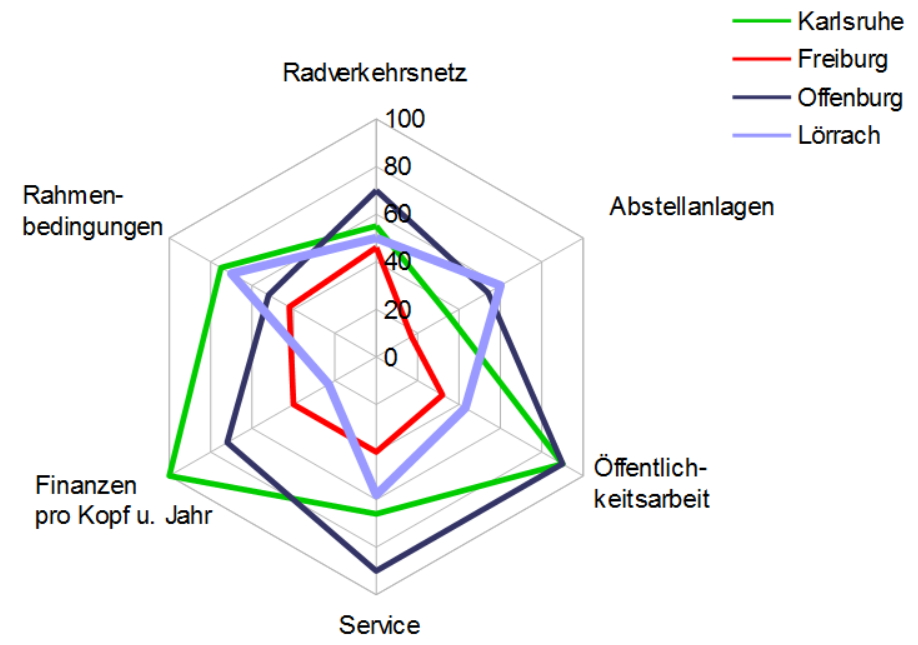 Rad-Verkehrspolitik Lörrach